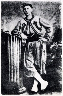 Augouard_en_1871_en uniforme de Zouave.